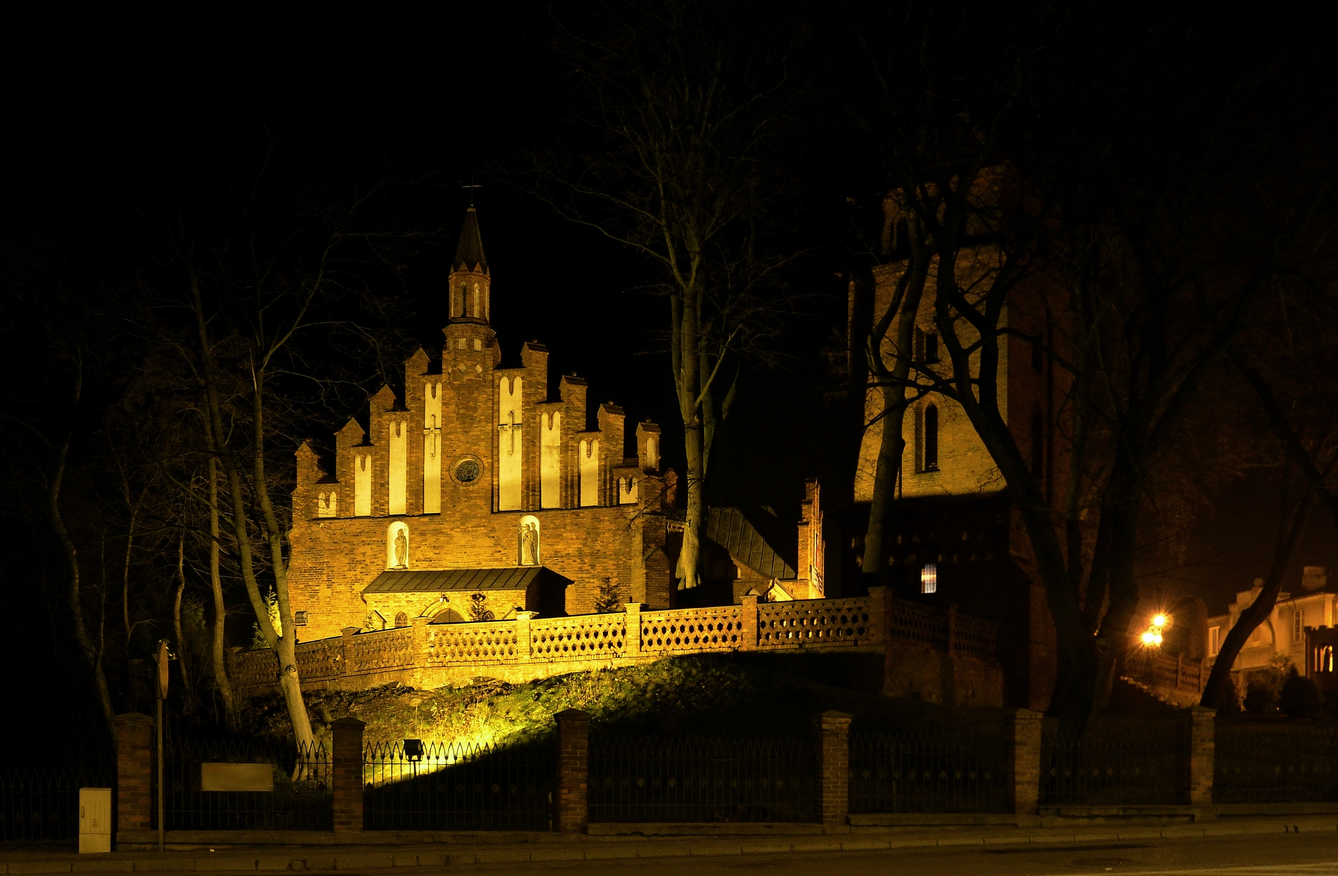 Kościół Świętej Trójcy w Rypinie, XIV w.